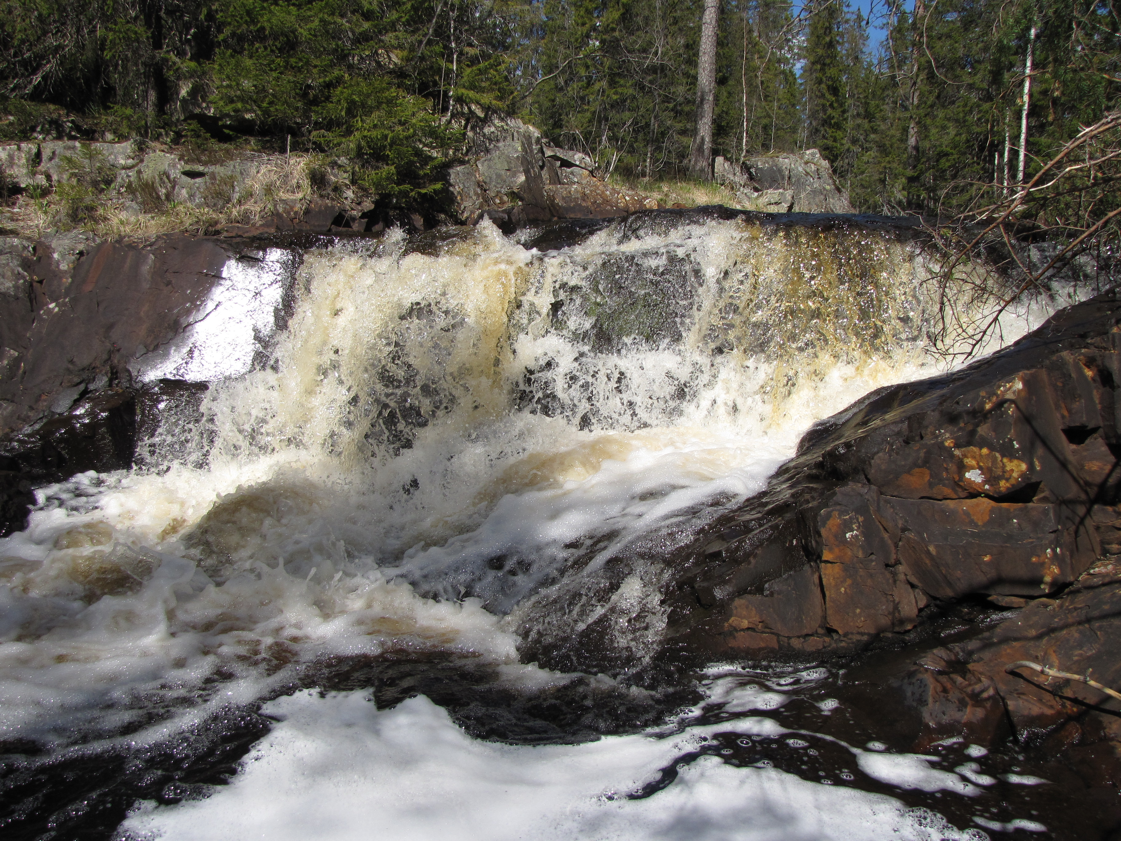 Brattforsen finns i nordvästra Västmanland, Örebro län.